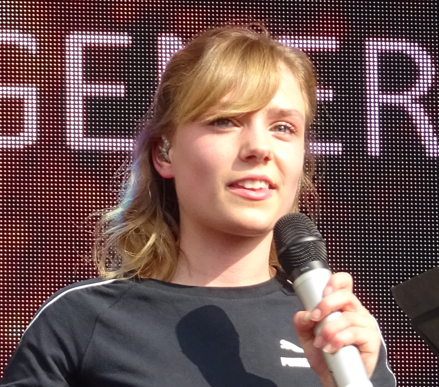 Auftritt auf der Hauptbühne beim Beelitzer Spargelfest (2018)